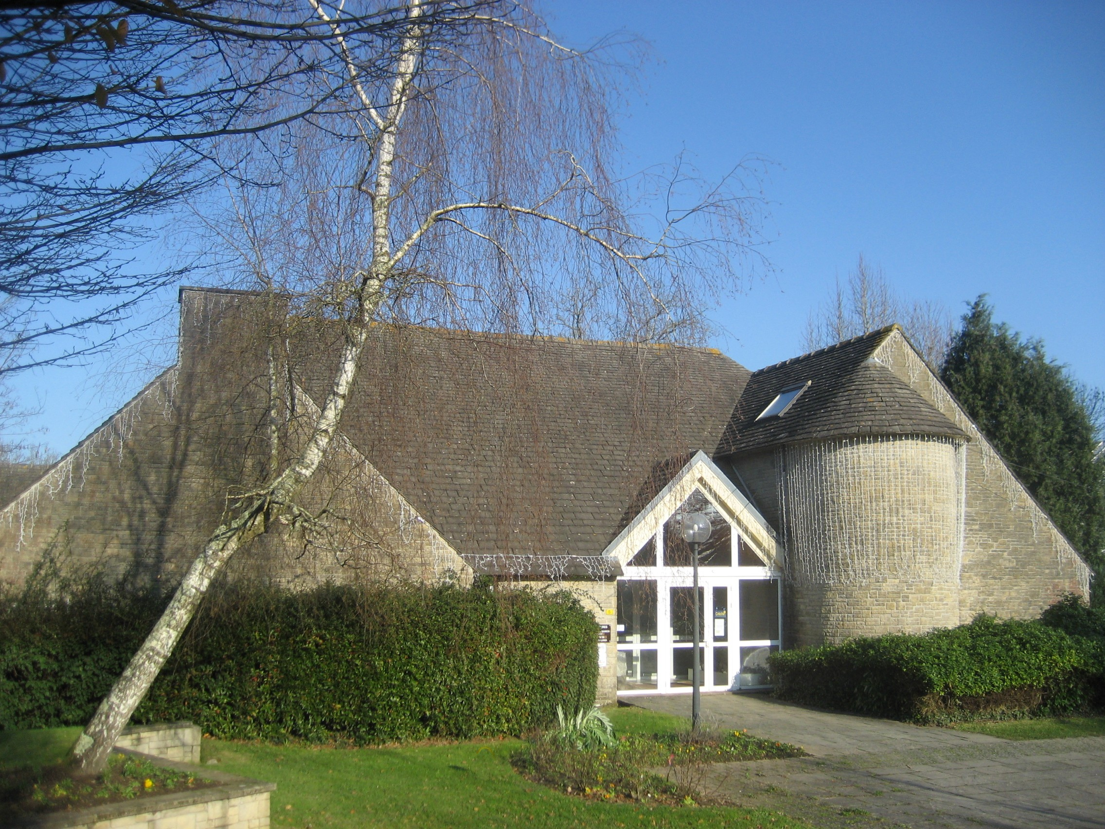 Mairie de Pleucadeuc, Décembre 2009